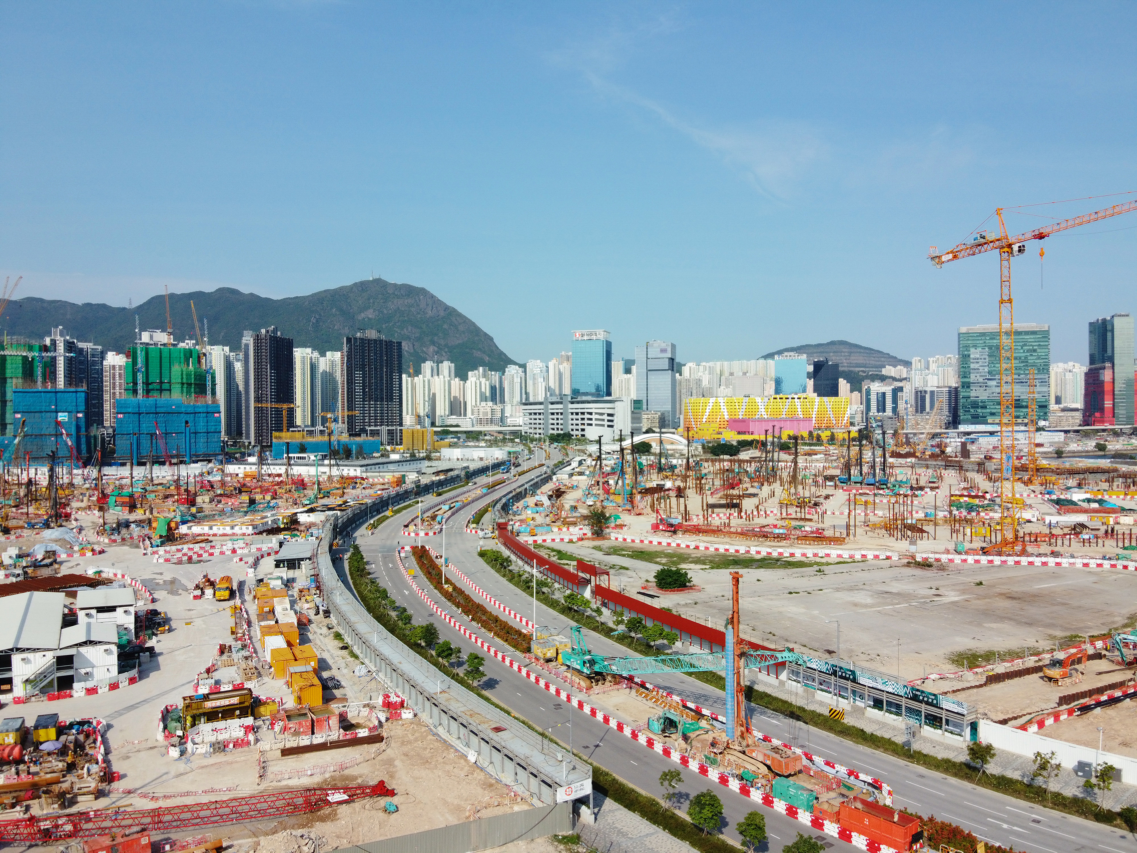 Shing Kai Road